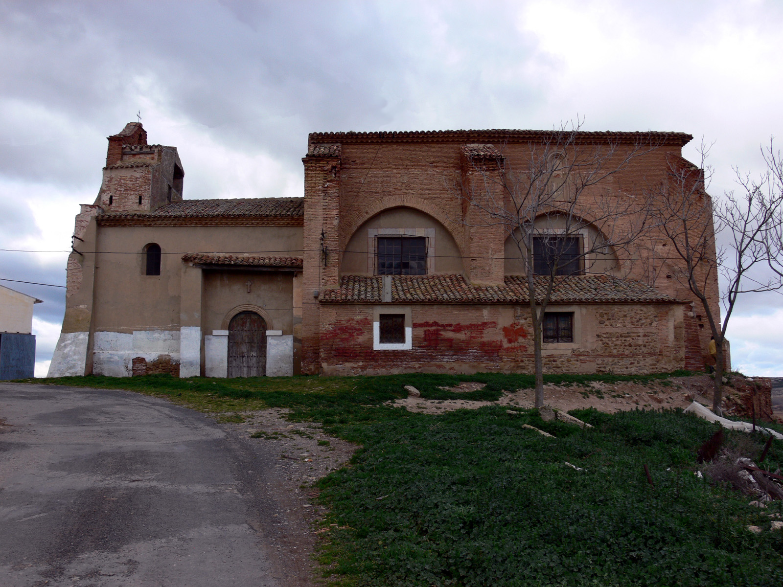 Iglesia de Santa María en Murillo de Calahorra (La Rioja - España).